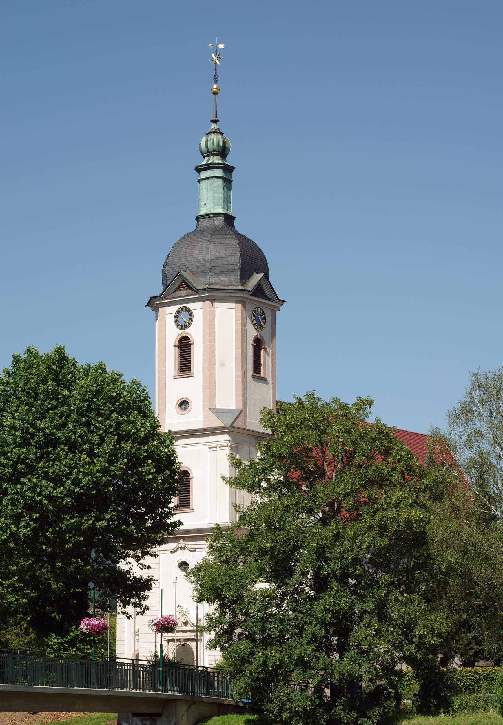 Die Pfarrkirche St. Laurentius im Gaggenauer Stadtteil Bad Rotenfels